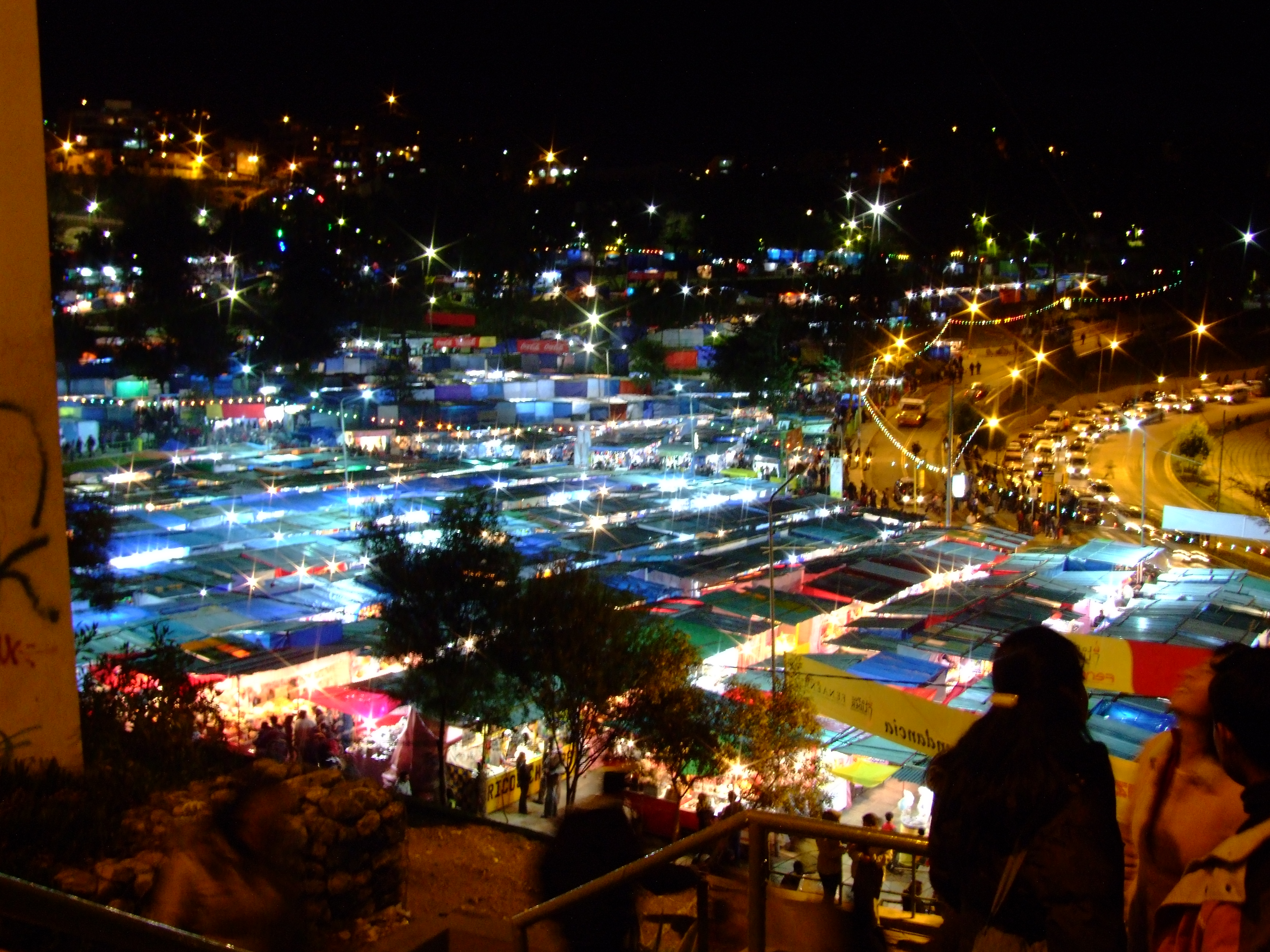 Vista de Alasitas 2010, La Paz, Bolivia